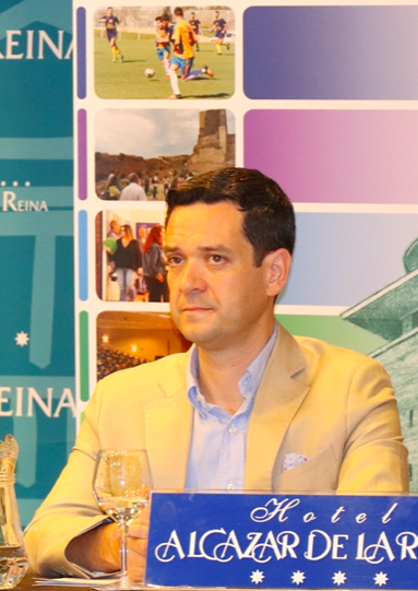 Curso Internacional sobre Terrorismo Yihadista de la Universidad Pablo de Olavide